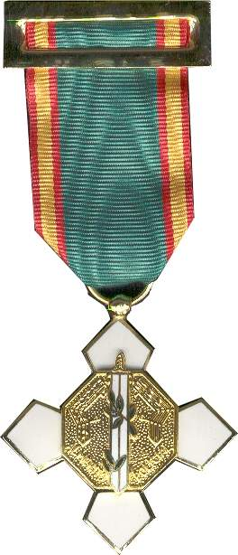 Condecoracion policial